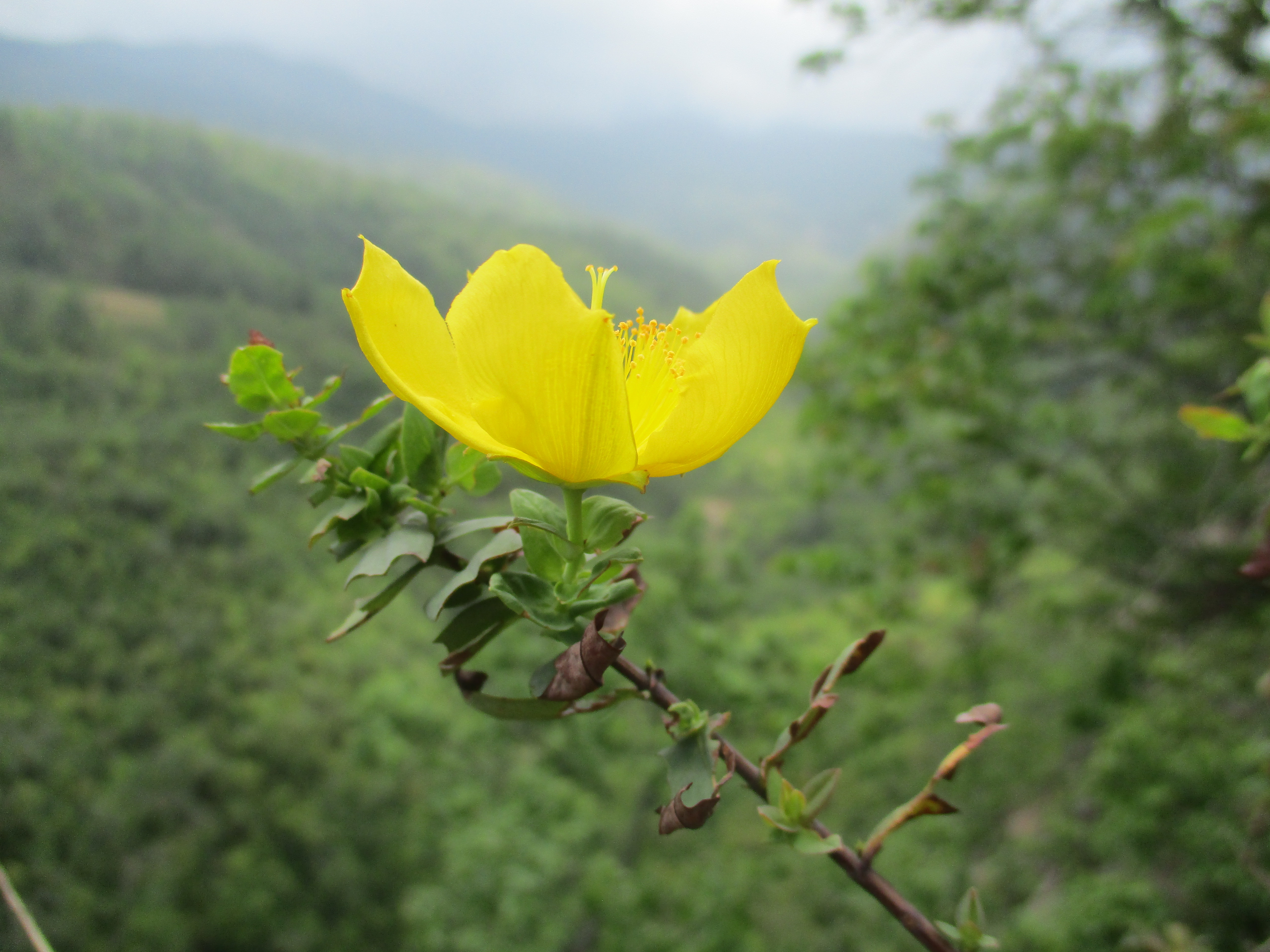 नेपाली: दोलखाको मिर्गे गाविसमा फुलेको प्याउली